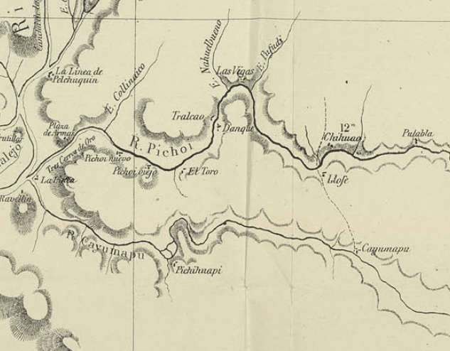 Rio Pichoy en el Mapa de Expedicion de la Francisco Vidal Gormaz 1869